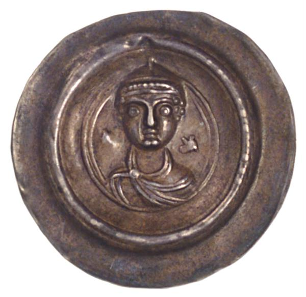 Münze Brakteat/Pfennig Silber: Otto, genannt Otto der Reiche (1125-1190)